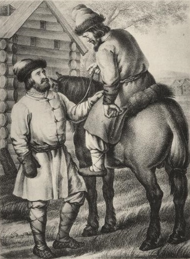 Русская одежда в XIV до XVIII столетия, азям сермяга и шапка.